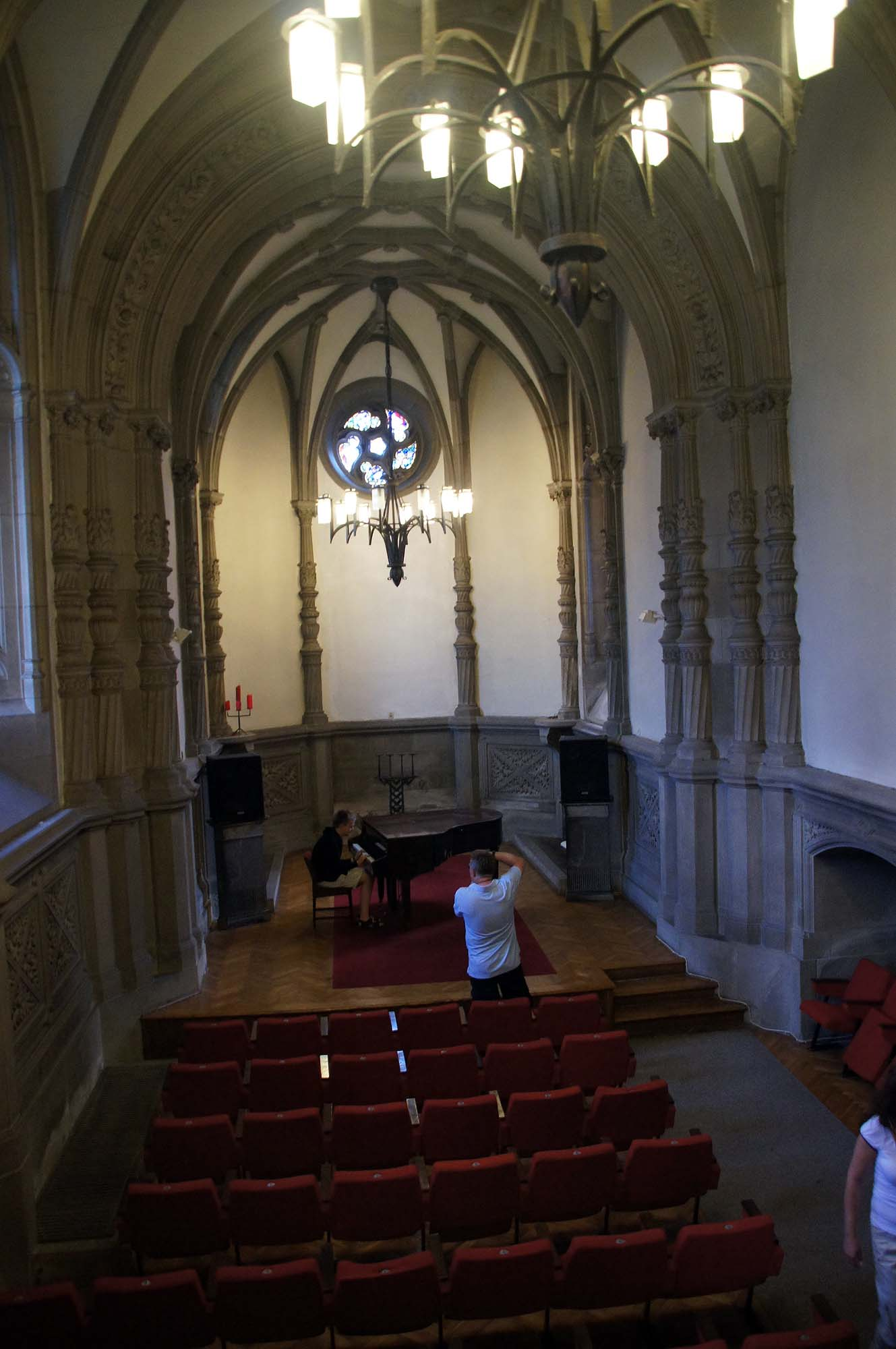 Moszna, zespół pałacowy, XVIII, XX